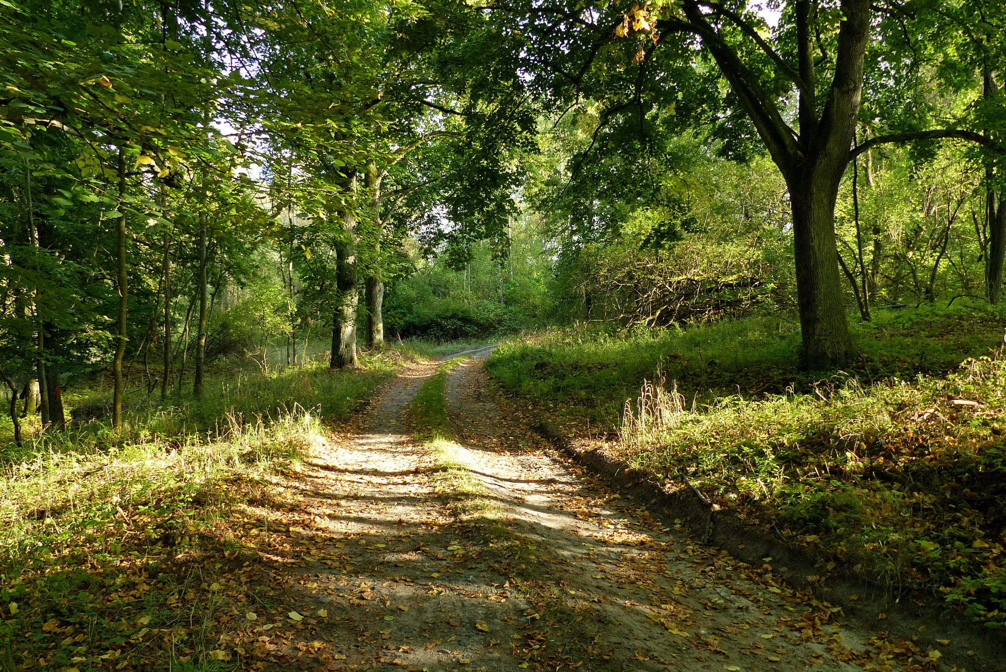 Cesta skrz bývalou Proseč